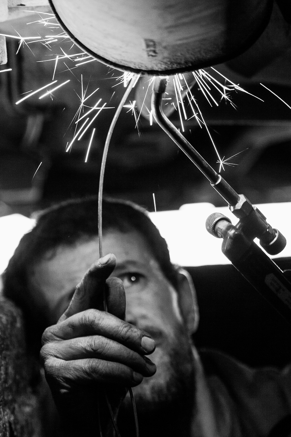 Réparateur de pots d'échappements, Alger, Algérie This is an image of "African people at work" from Algeria